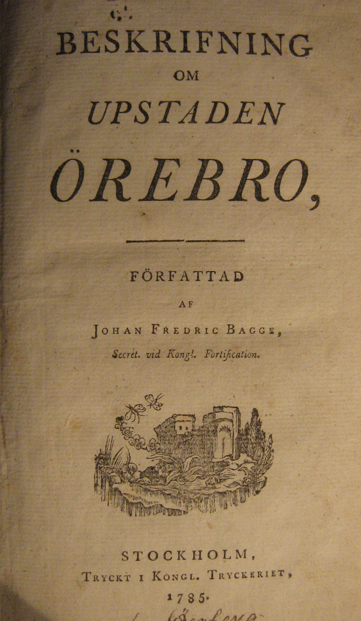 Titelsidan till "Beskrifning om Upstaden Örebro" av Johan Fredric Bagge